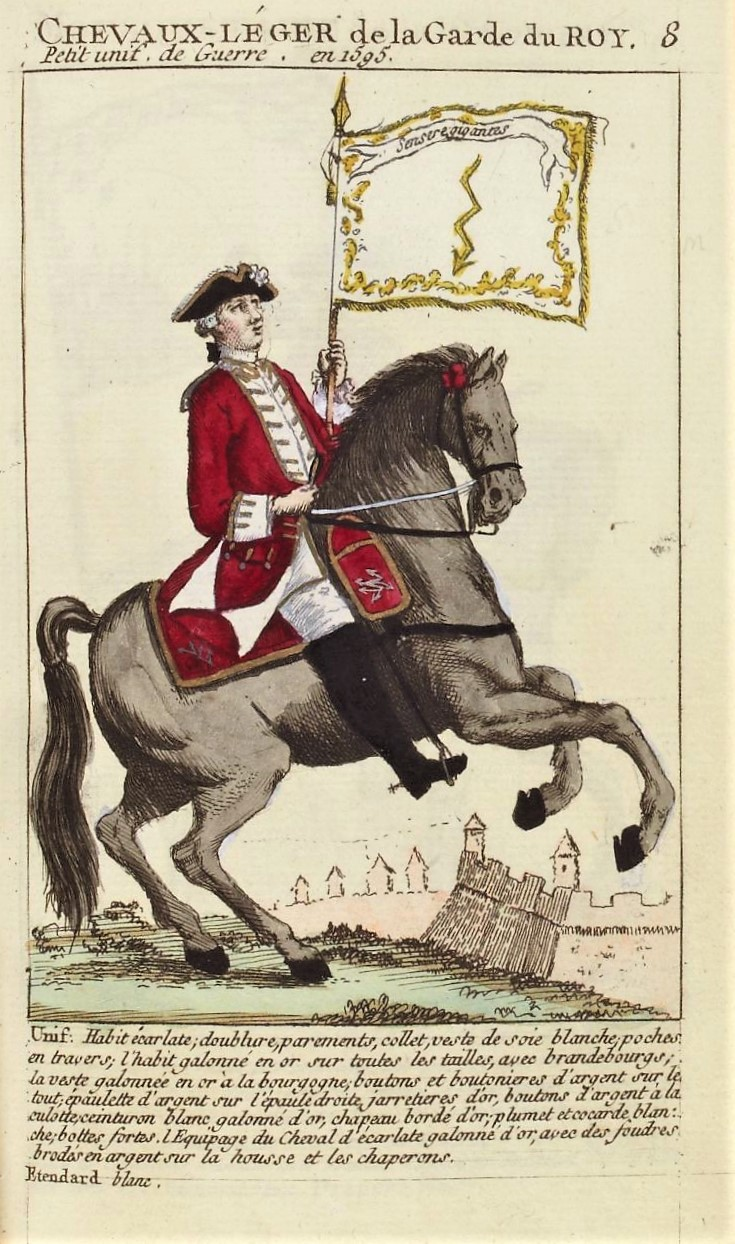 Vue extraite de l'ouvrage de Claude-Antoine Littret de Montigny : Uniformes militaires, où se trouvent gravés en taille-douce les uniformes de la Maison militaire du Roi, publié en 1772.